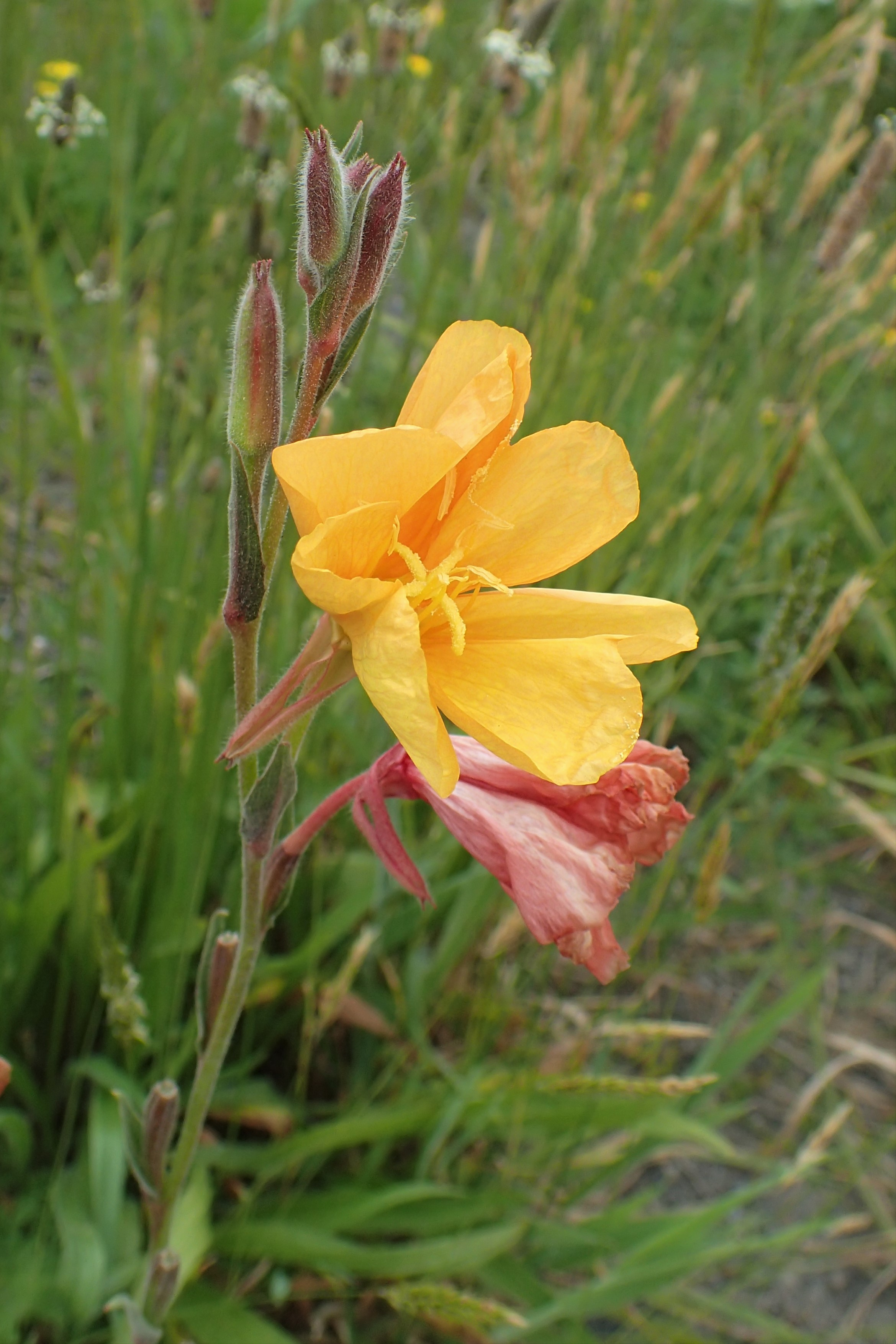 Oenothera stricta in TeTeko, Bay of Plenty (New Zealand)